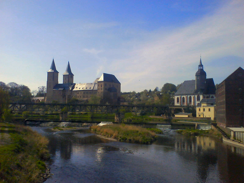 Schloss Rochlitz